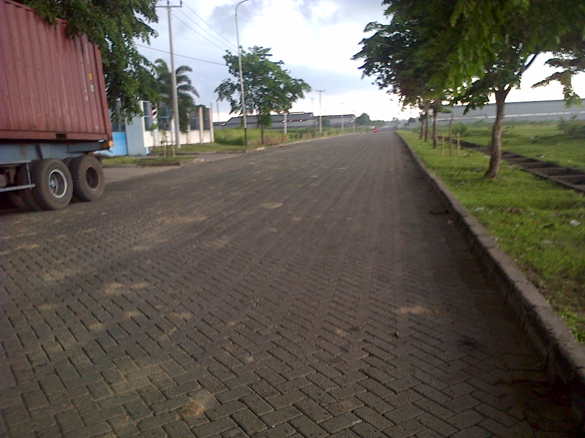 Jl. Modern Industri VII Kav I, Kawasan Industri Modern Cikande - Serang